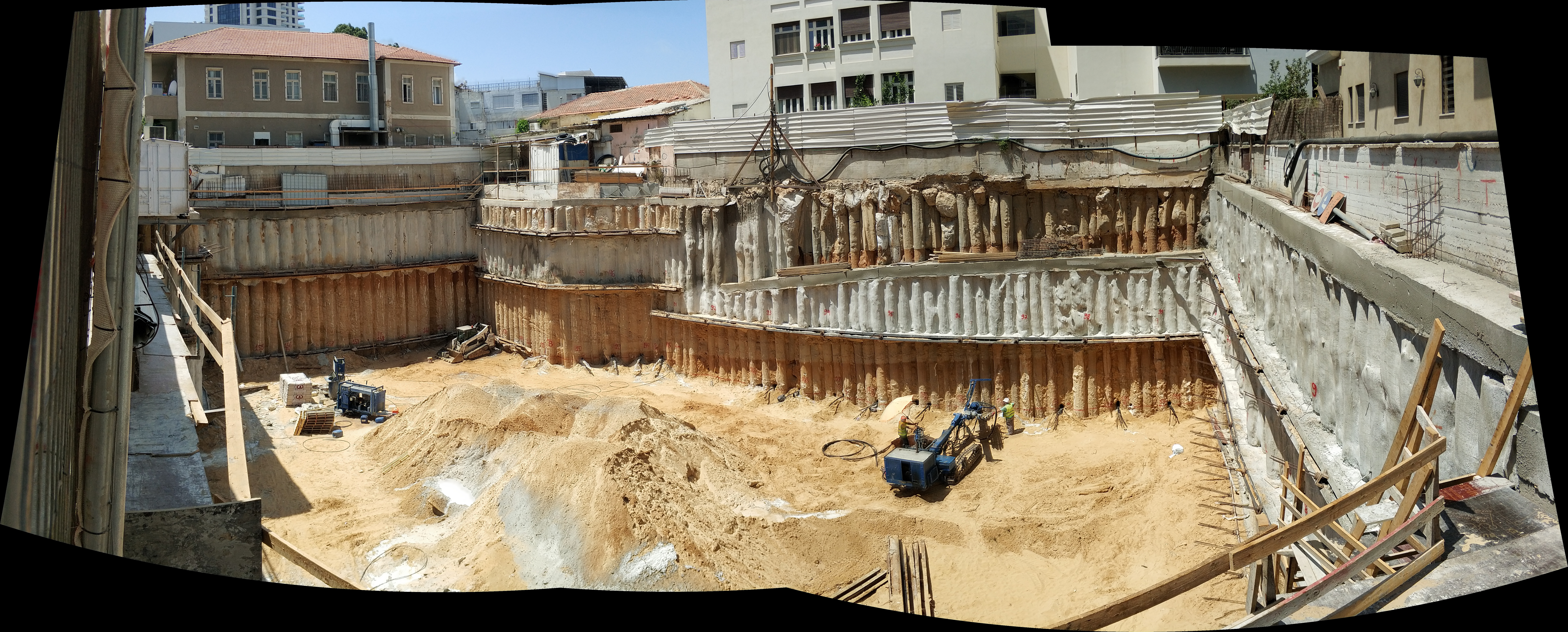 כלונסאות בקיר שיגומים